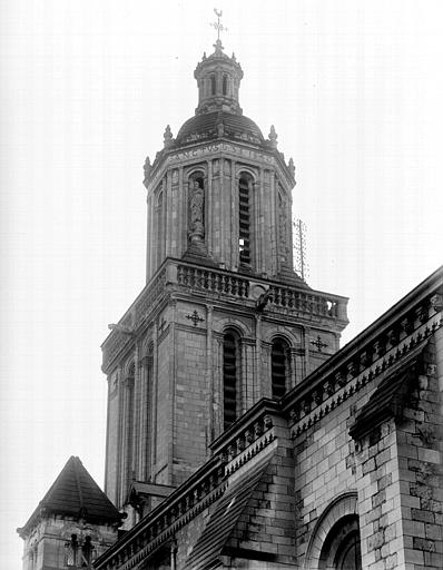 Clocher de l'Église de la Trinité d'Angers par Lefèvre-Pontalis.